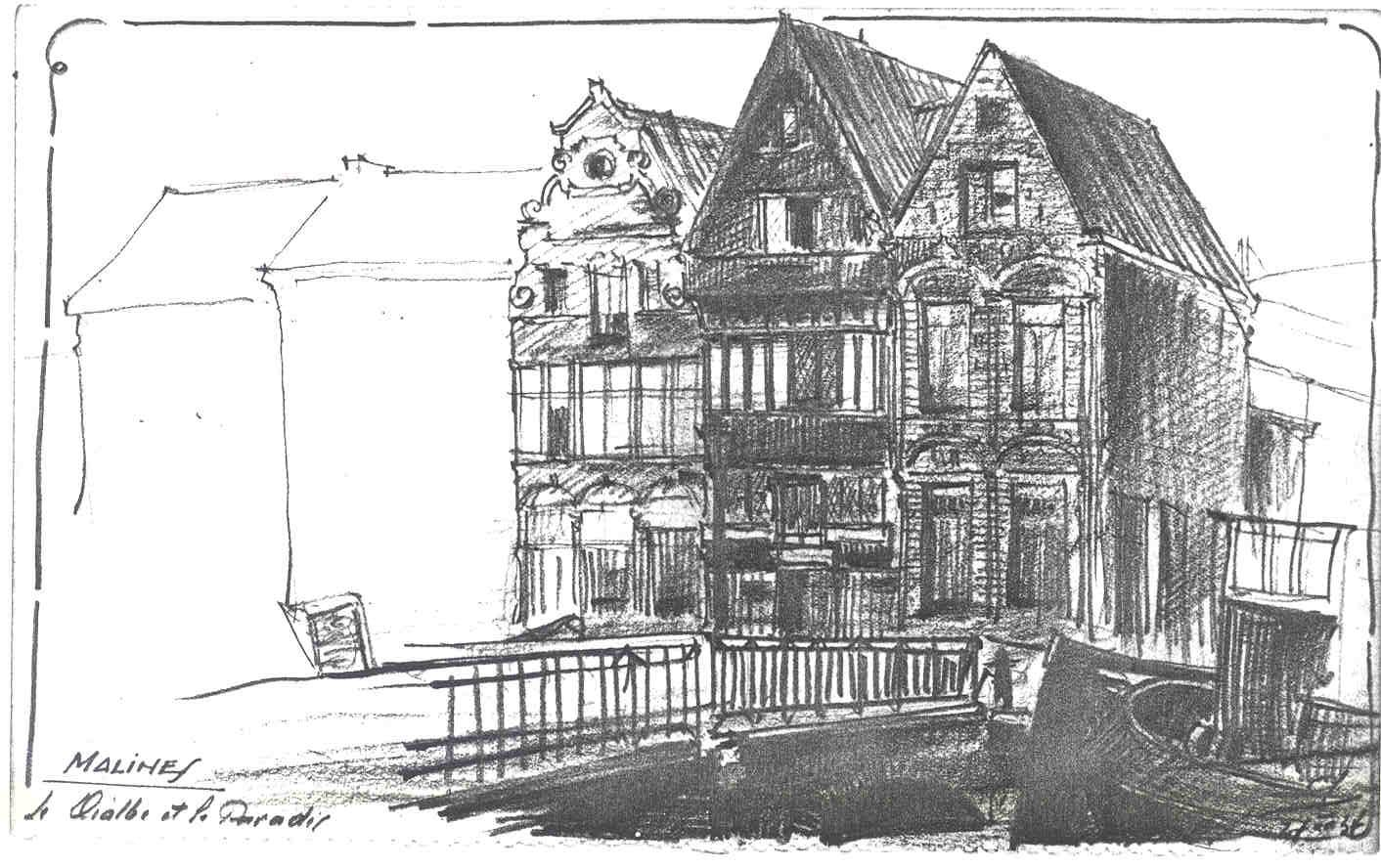 Malines (Mechelen) Maisons le Diable et le Paradis